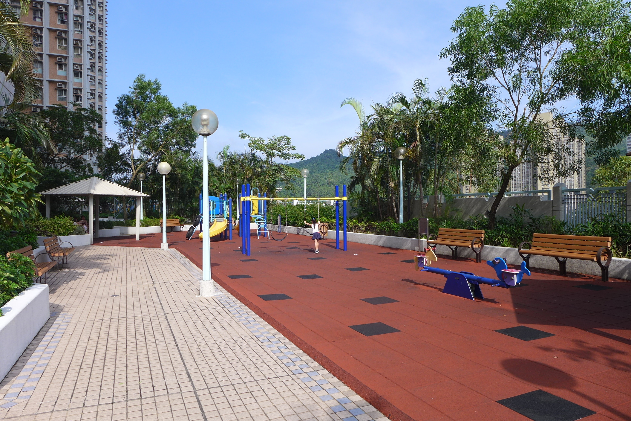 Po Tat Estate Podium Garden